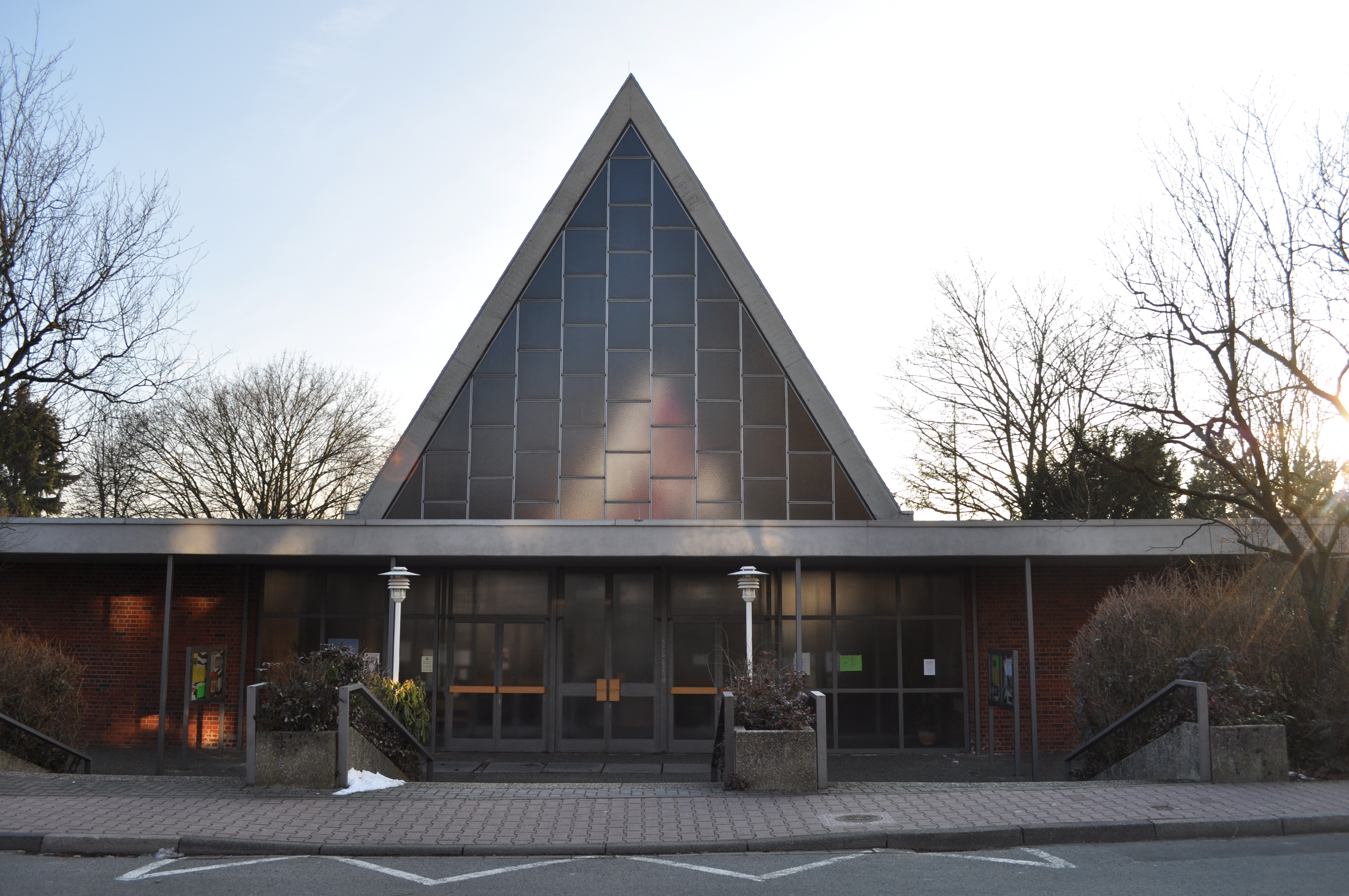 Katholische Kirche St. Bonifatius in Steinbach